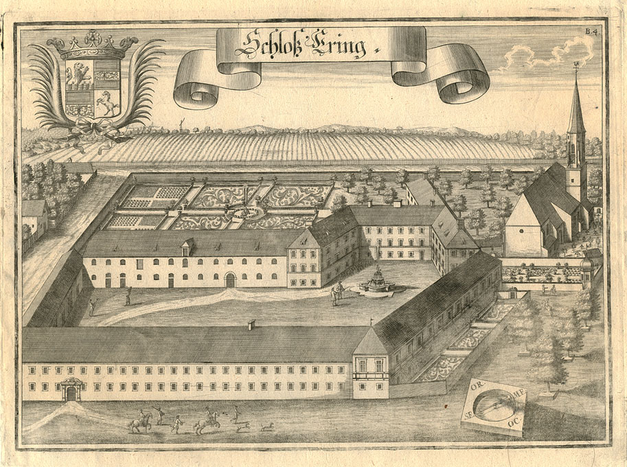 Kupferstich von Schloss Ering, Ering, Niederbayern